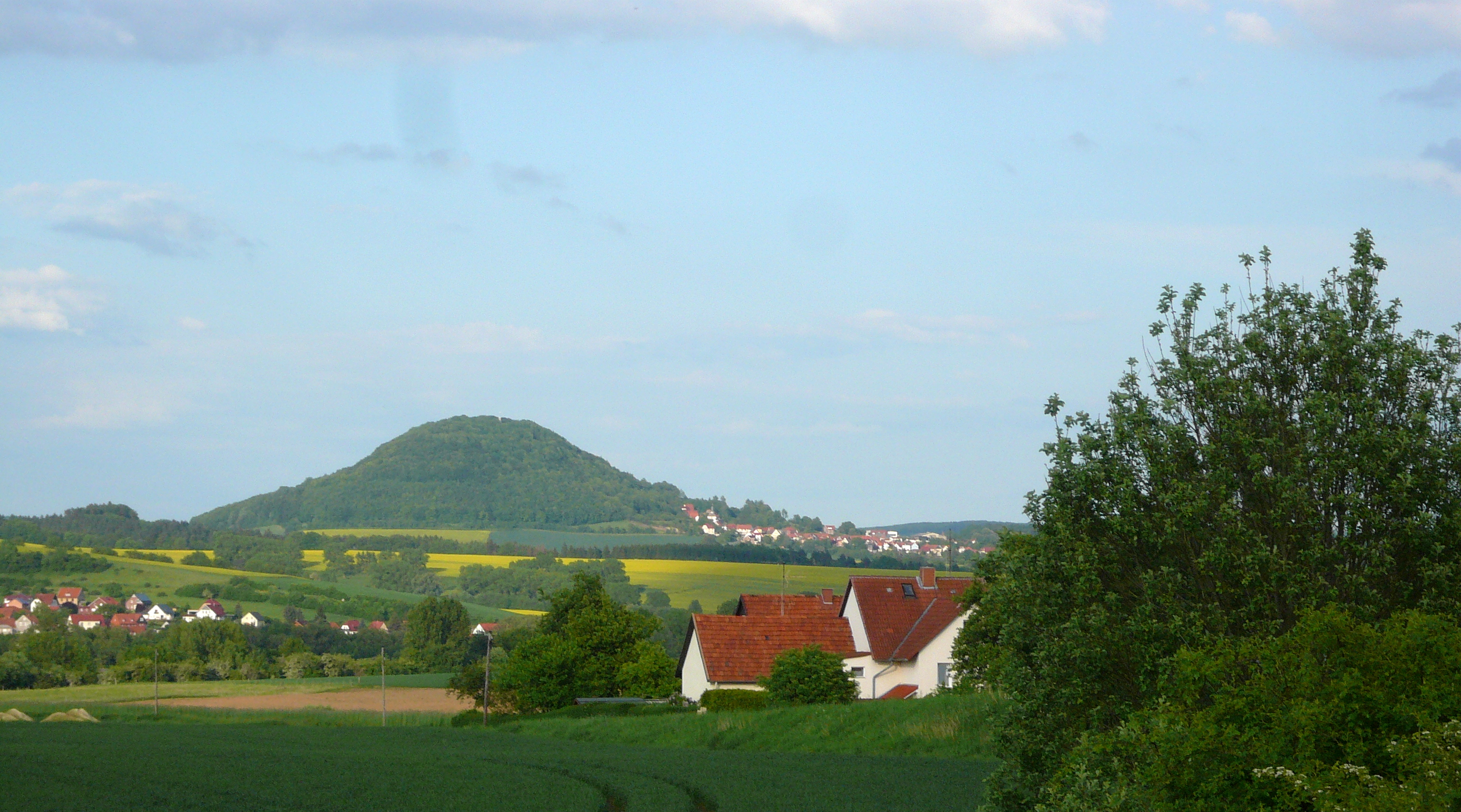 Blick von Westen von den Schmiedeköpfen (Hottenrode) auf den Rusteberg